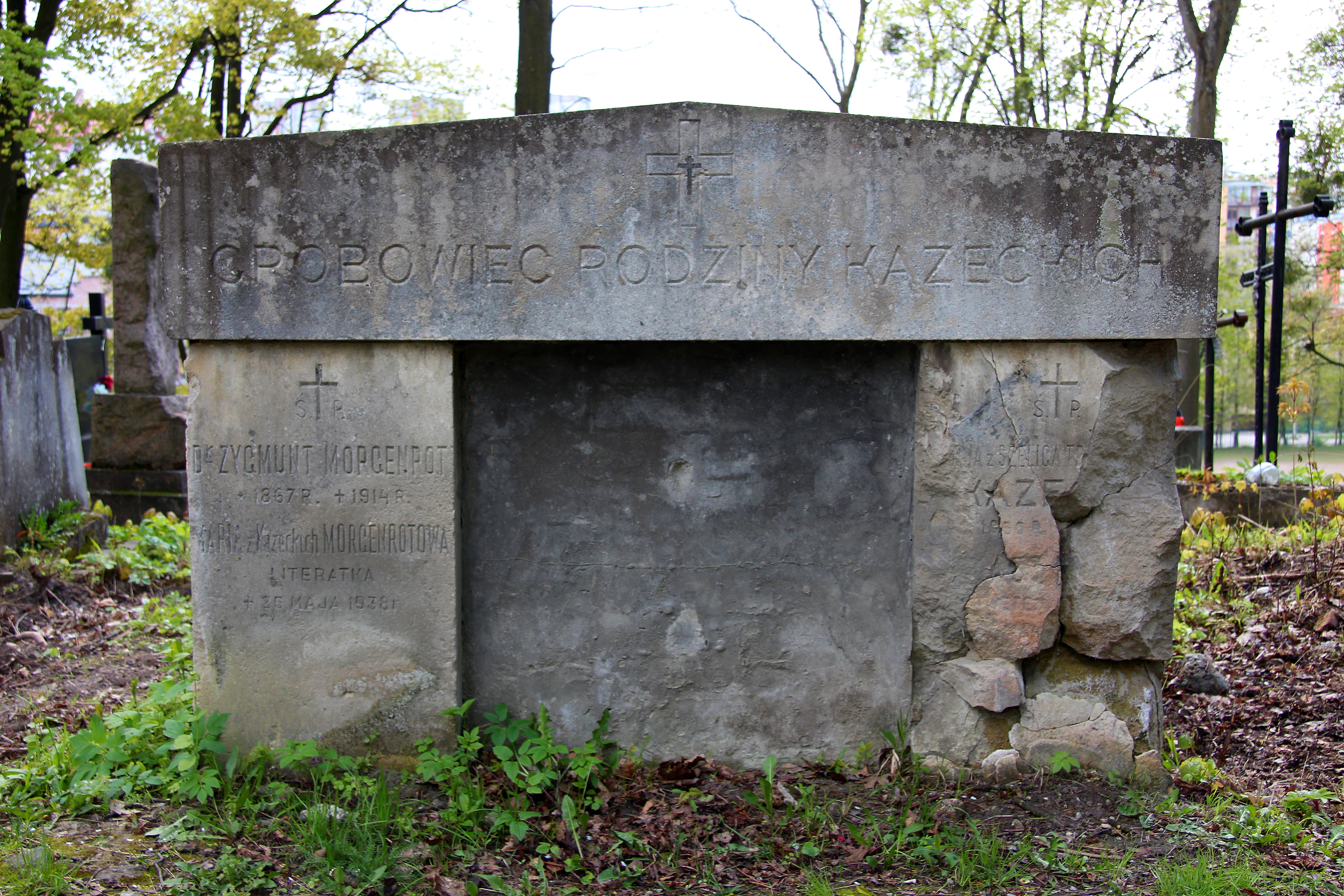 Гробівець родини Казецьких.Личаківський цвинтар , поле № 79.